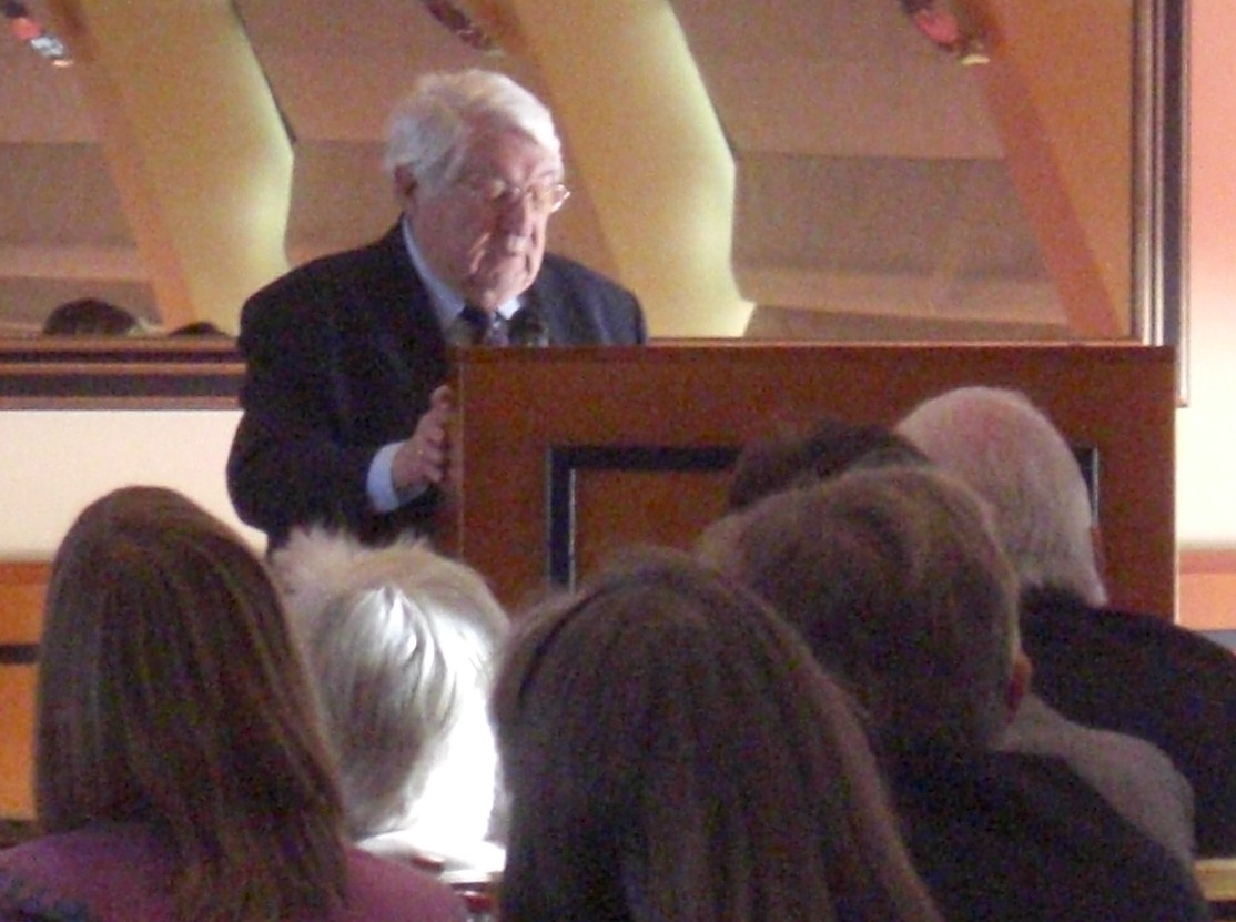 Helmuth Kern bei einem Vortrag anläßlich des 10. Geburtstages der Palliativstation Rissen (Hamburg)